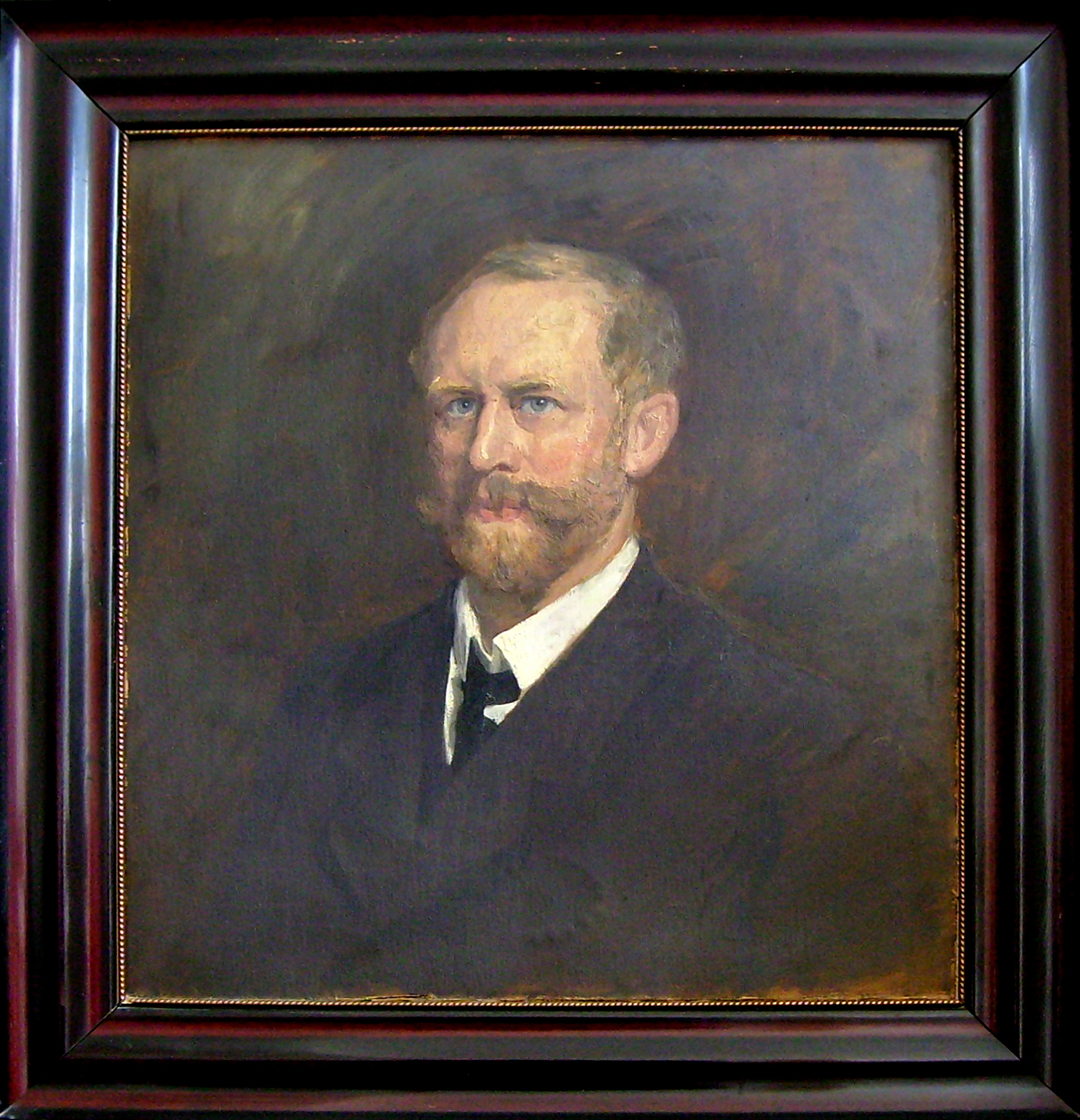 Oil-Portrait Emil Strub